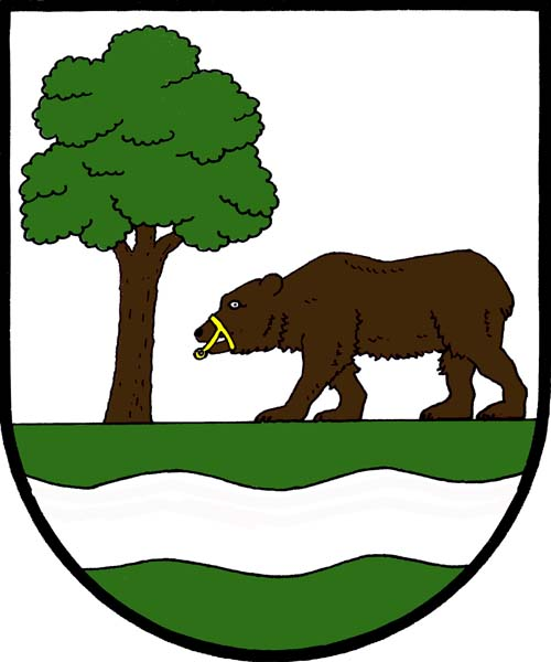 Česky: znak obce Kunčice nad Labem